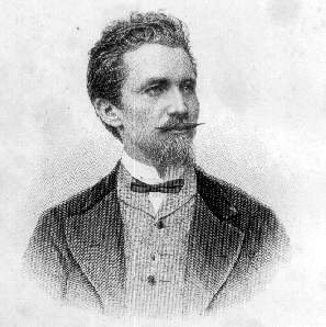 Gerhard Rohlfs starb 1896.